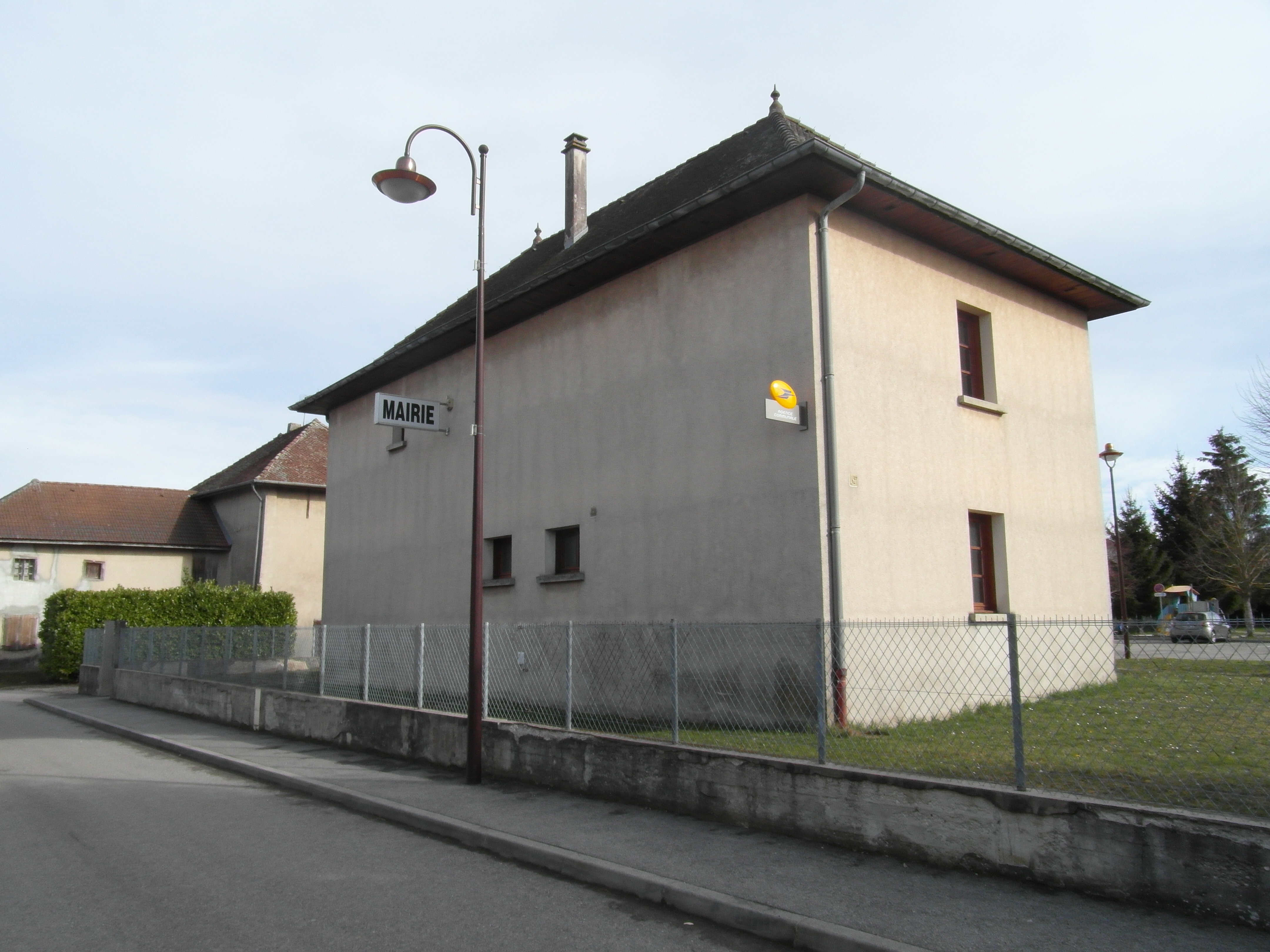 Mairie de Bizonnes en mars 2019